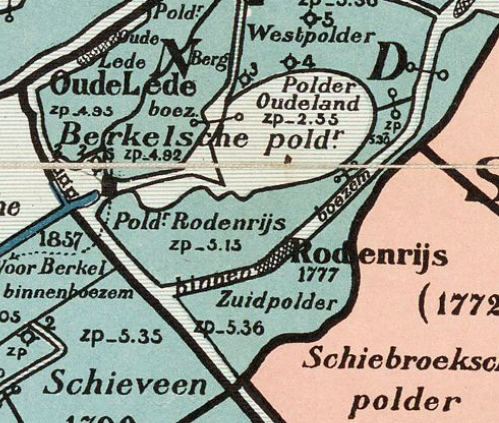 Zuidpolder